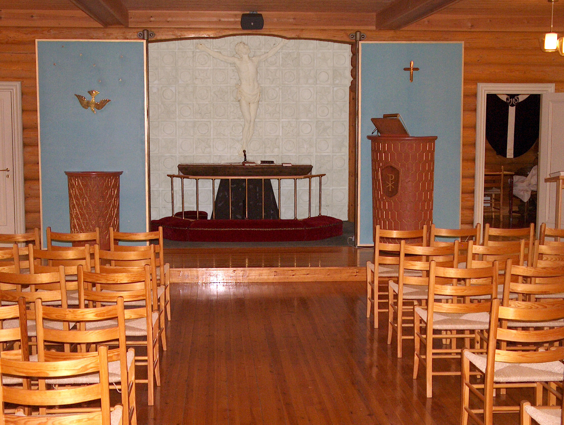 Strømsoddbygda kapell (koret, prekestol og døpefont)